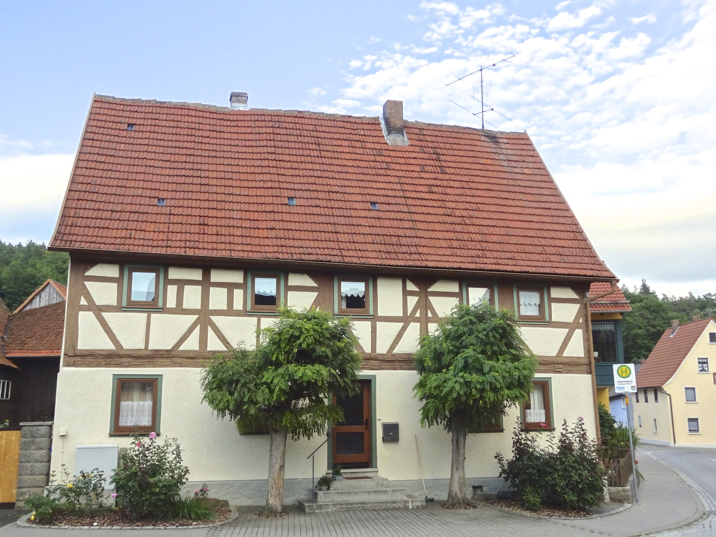 Bauernwohnhaus Hauptstraße 44 in Unterelsbach – Eckhaus mit Satteldach, zweigeschossig, massives Erdgeschoss, Obergeschoss und Giebel mit reichem Zierfachwerk (geschnitzte Eckständer, Feuerböcke, Rautengitter), 18. Jahrhundert This is a photograph of an architectural monument.